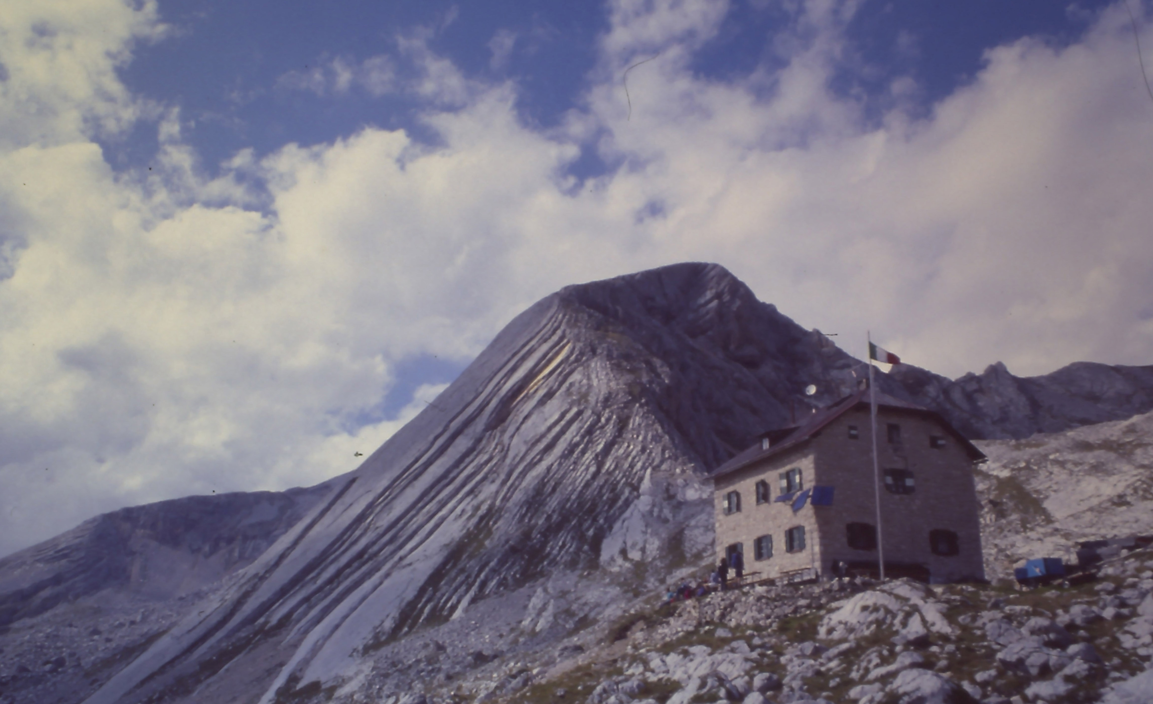 il Rifugio Biella ai piedi della Croda del Becco (2.810 m)